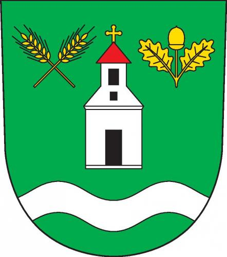 Pavlovice, okres Benešov, znak